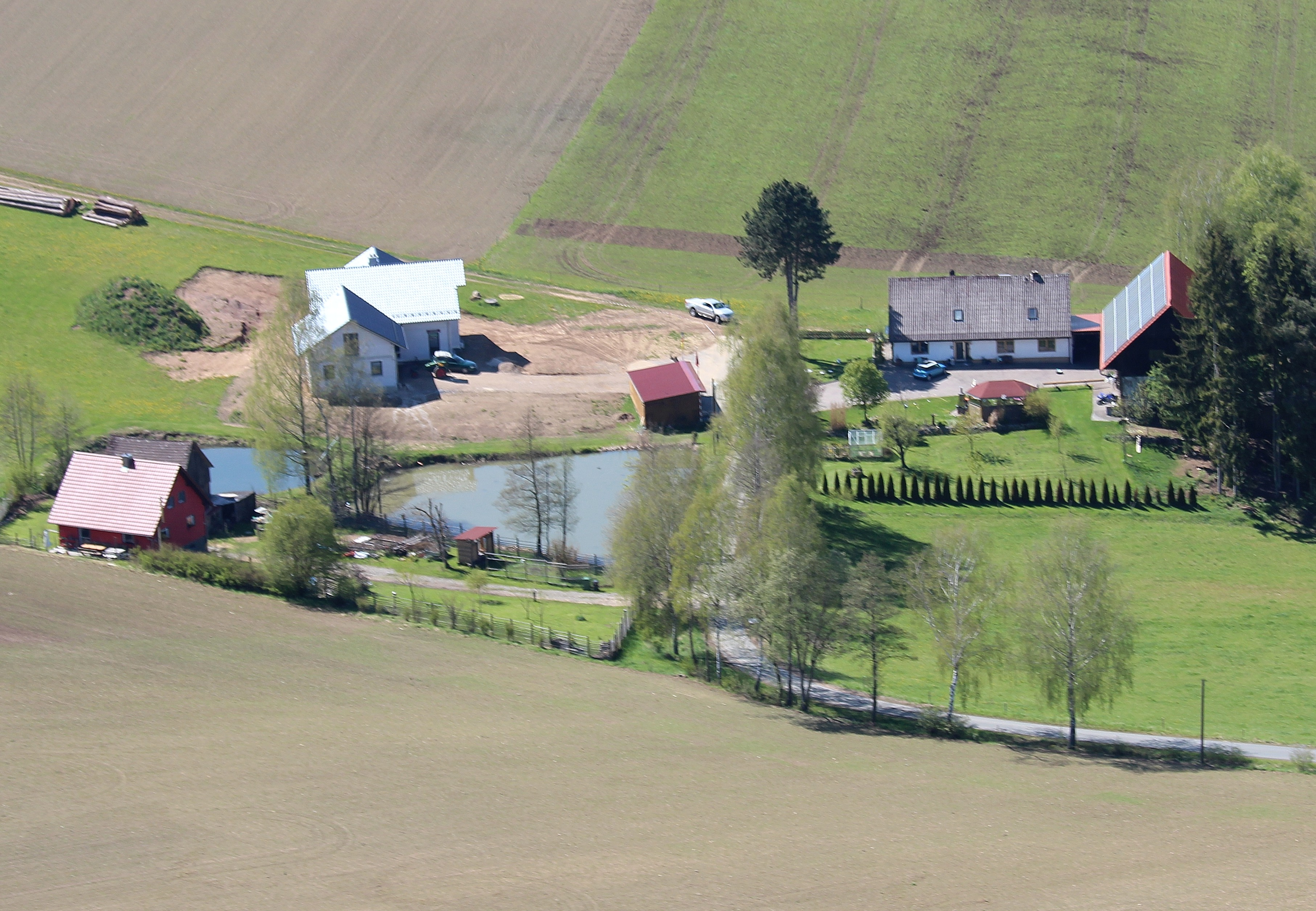 Stöcklhof, Gemeinde Gleiritsch, Landkreis Schwandorf, Oberpfalz, Bayern